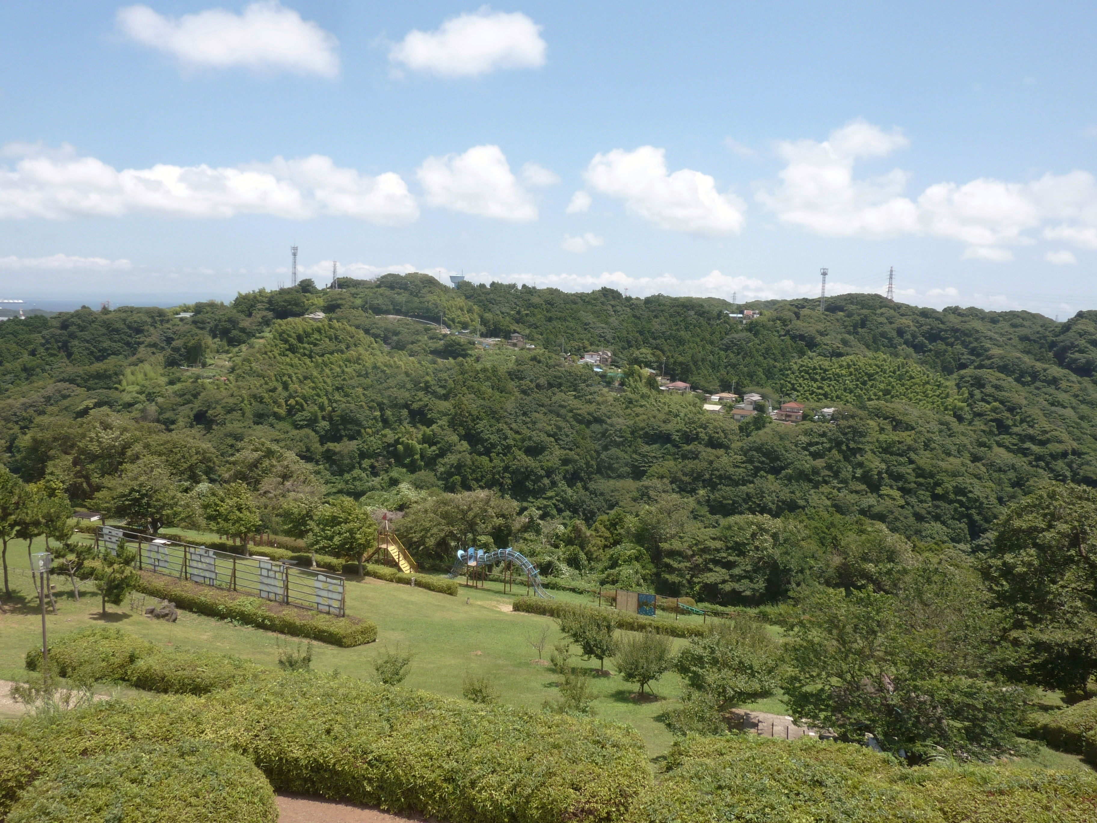 田浦梅の里の展望台から十三峠を望む（神奈川県横須賀市）